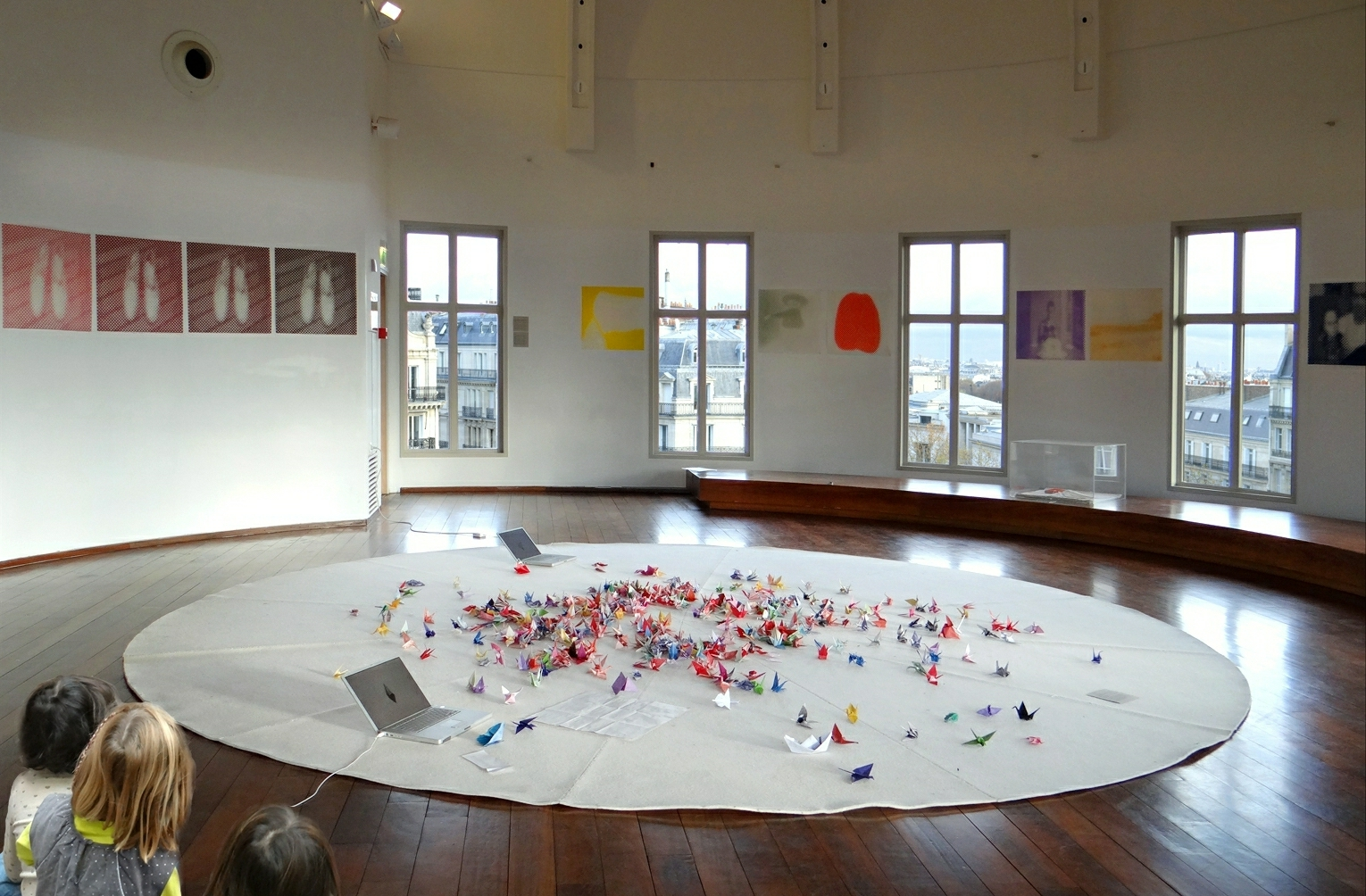 Au centre de la rotonde du musée Guimet, le salon de transformation blanc, une oeuvre participative émouvante de Marie-Ange Guilleminot (1999), au mur le Nuancier Atelier Michaël Woolworth (2003) Oeuvres du Centre national des arts plastiques présentées dans le cadre de la manifestation Iwent Dans le salon de transformation blanc, Guilleminot nous invite ainsi, à l’aide d’une vidéo, à réaliser des Tsuru, pliages en forme de grues réalisés selon la technique de l’origami. Profondément marquée par la découverte du Monument des enfants pour la Paix d’ Hiroshima, Marie Ange Guilleminot, nous rappelle, à travers ce rituel, la destinée d’une jeune fille japonaise, Sadako Sasaki, victime de la bombe atomique, qui avait pratiqué l’origami dans l’espoir de guérir. Extrait du livret de l'exposition Site du musée Guimet